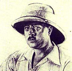 Portrait de Louis Audouin-Dubreuil, chef adjoint dans la Croisière noire